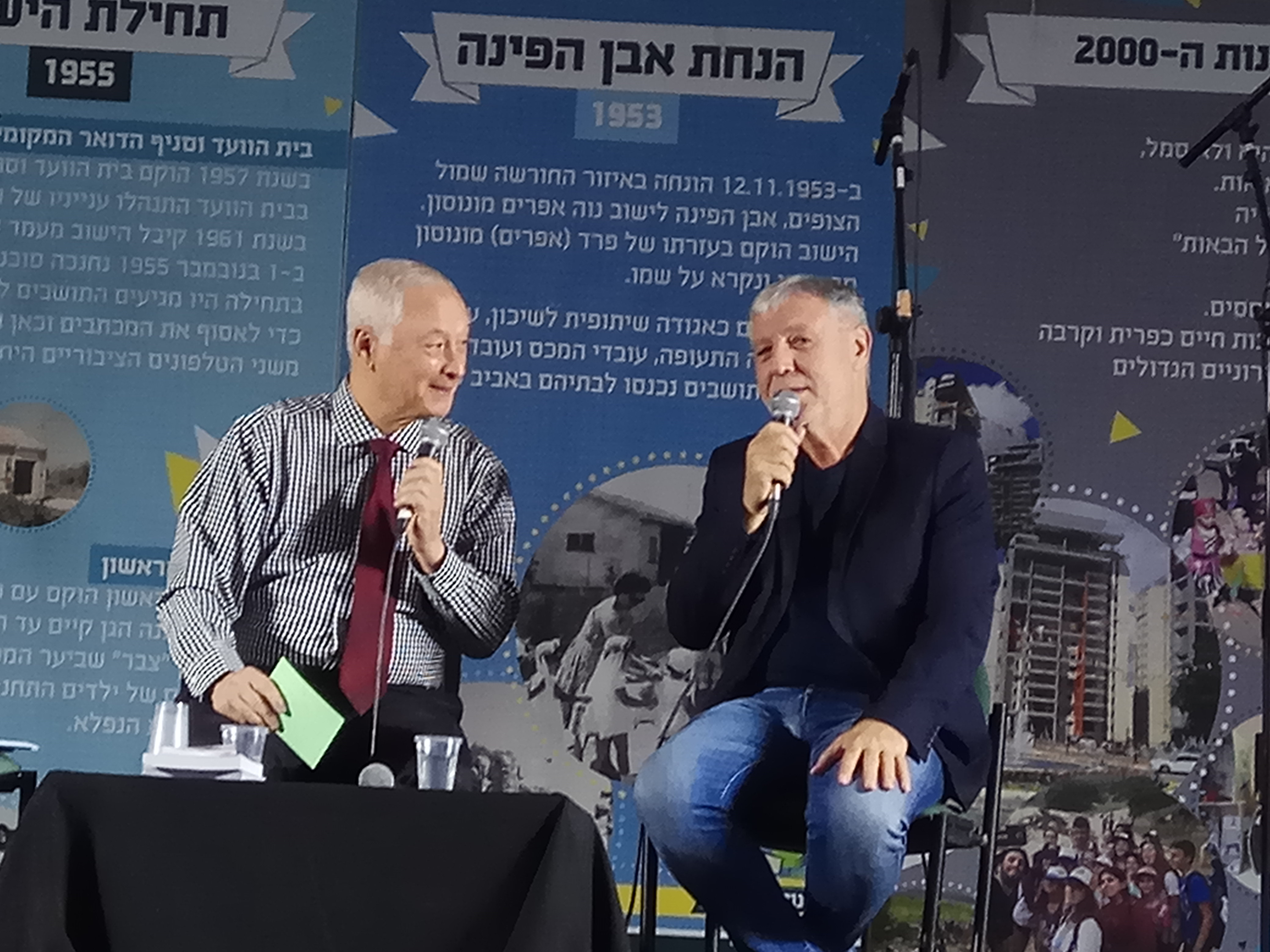 ח"כ מאיר כהן באירוע שבתרבות עם אבי בטלהיים בנווה מונוסון